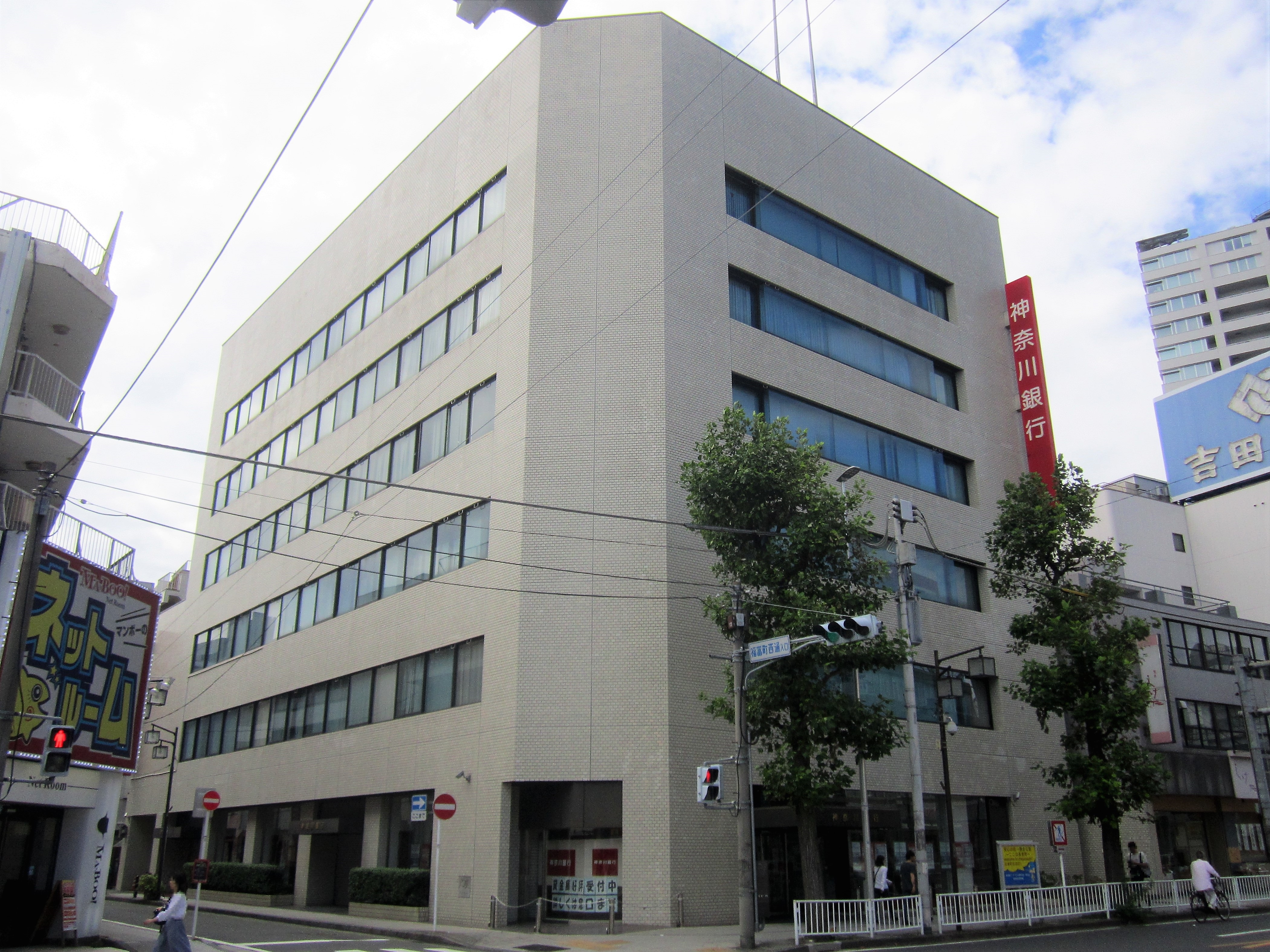 神奈川銀行 本店（横浜市中区長者町）